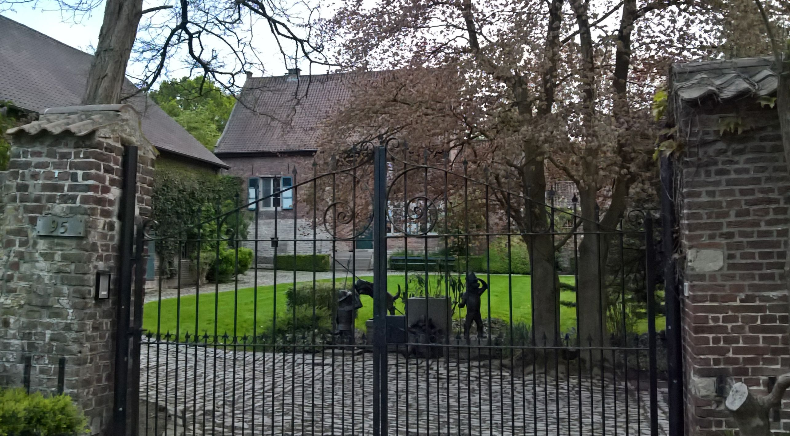 Beschermde hoeve uit de 17e eeuw